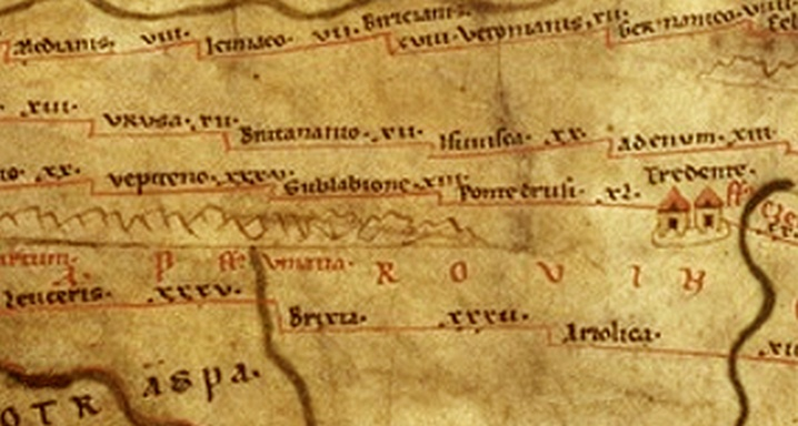 Lage von Bruneck, Klausen oder Waidbruck, Pons drusi, Trient auf der Tabula Peutingeriana